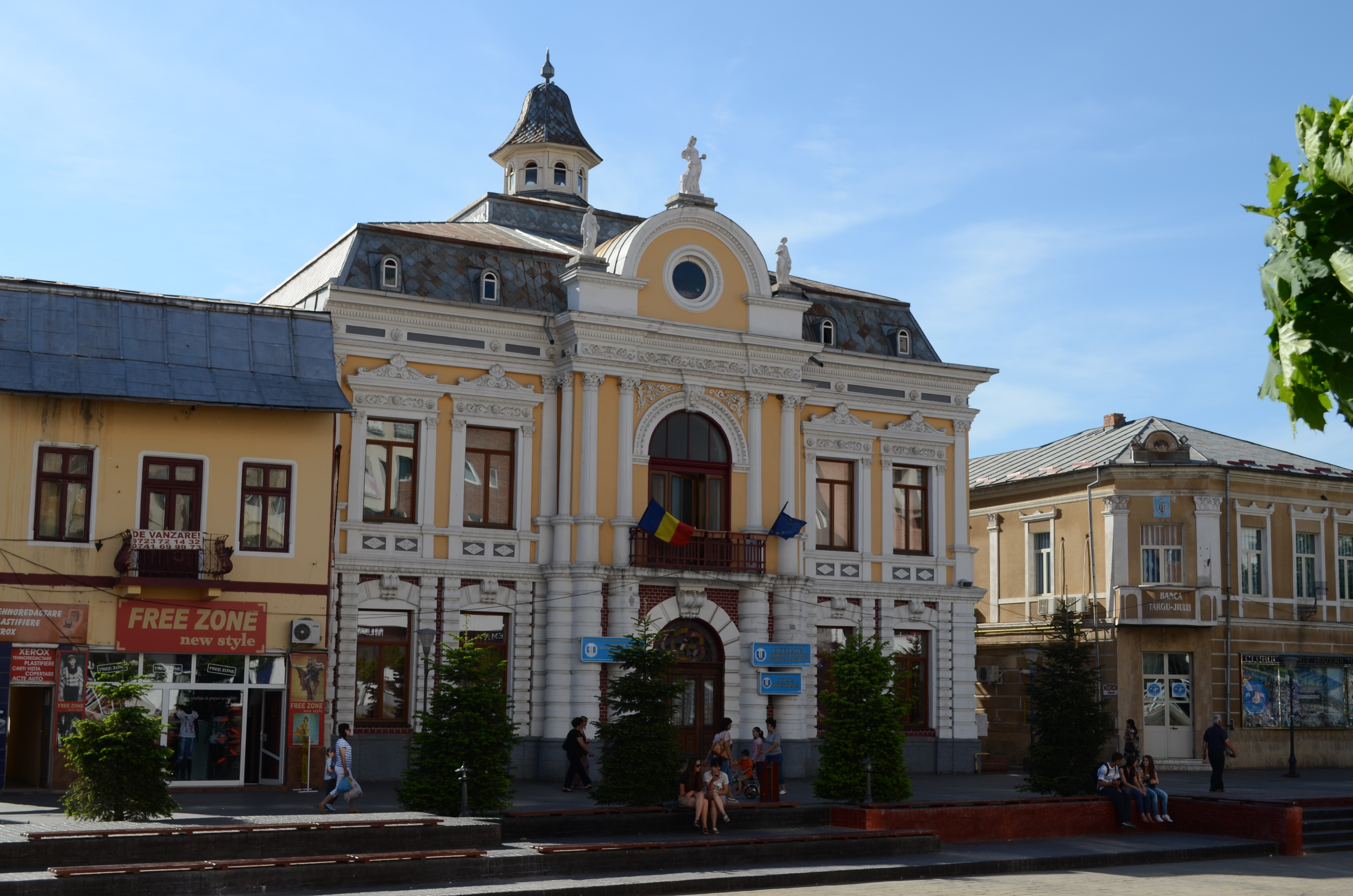 Palatul Finanțelor, azi Facultatea de Științe Economice și Gestiunea Afacerilor a Universității Constantin Brâncuși (Str. Victoriei nr. 24, Târgu Jiu)